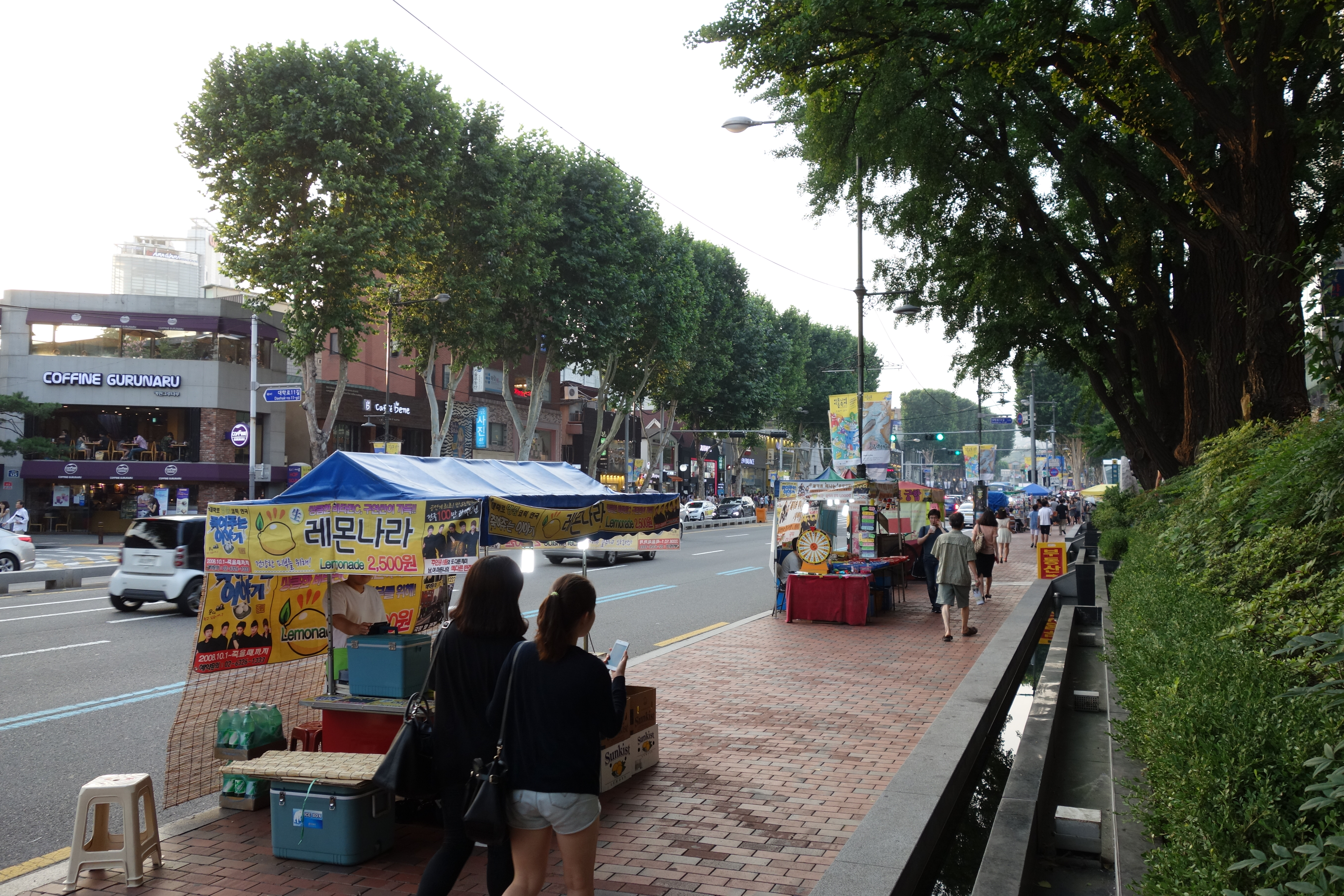 惠化駅 駅上の大学路